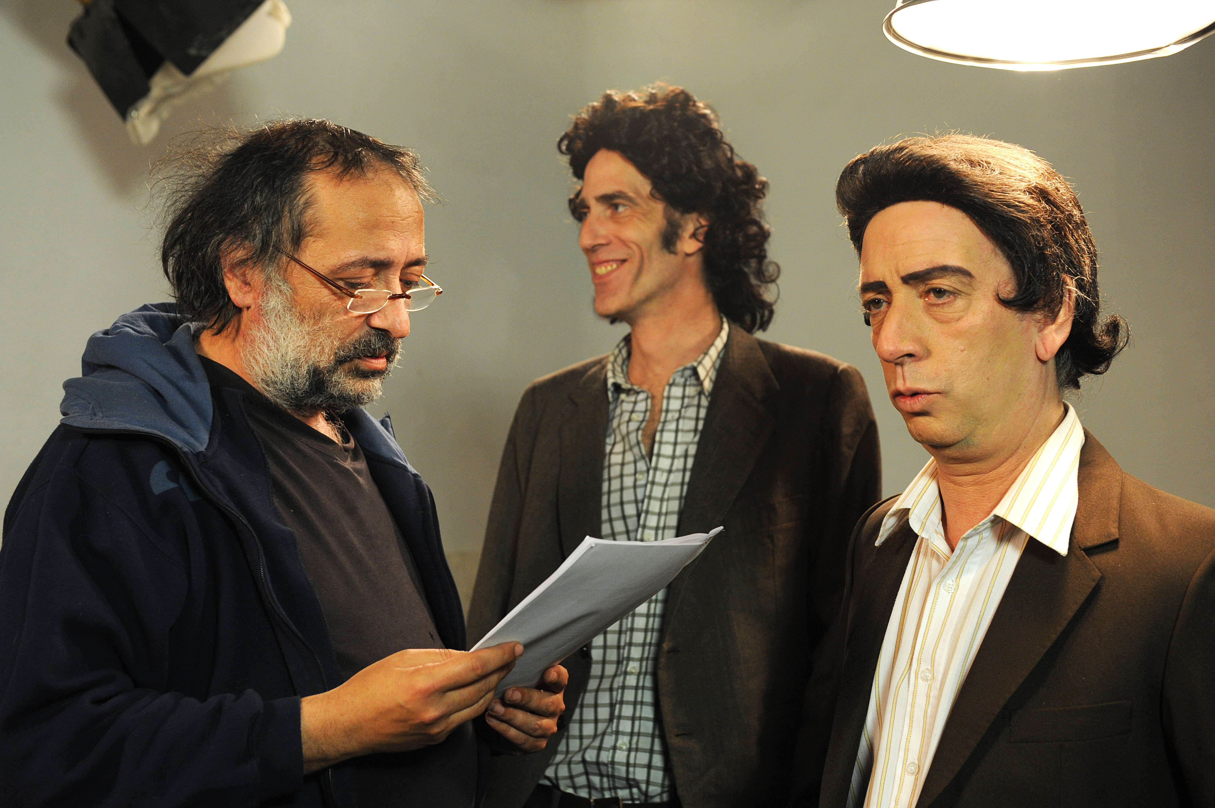 Novena temporada. Foto TVP 2014.